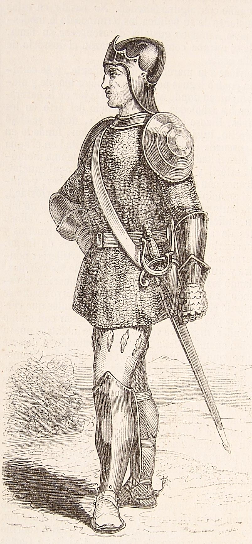 Puede acceder al libro completo en el siguiente enlace : Historia de la conquista de Méjico : población y progreso de la América septentrional, conocida por el nombre de Nueva España / escrita por Antonio Solís. - Madrid : Gaspar y Roig, 1851